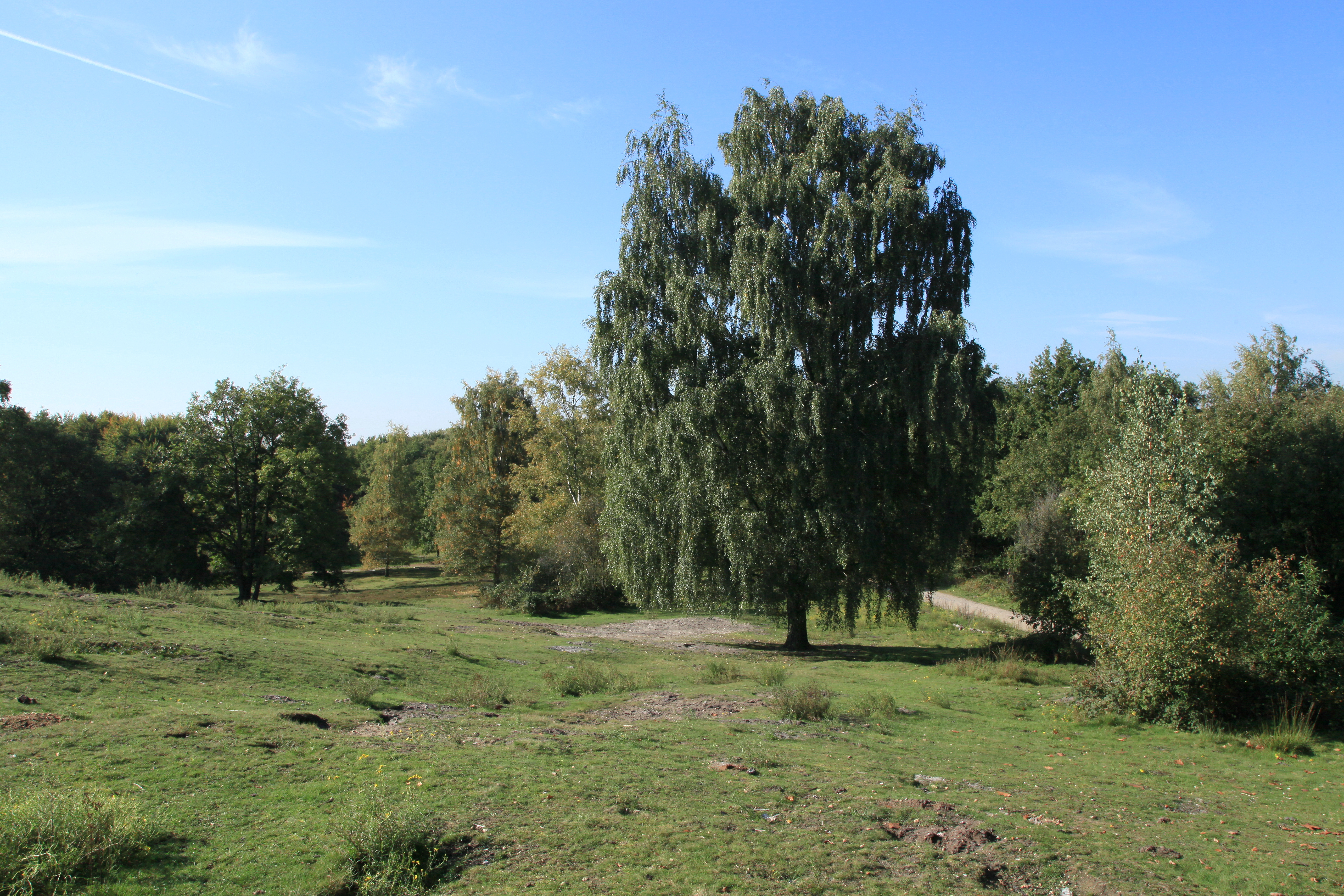 Sandberg im Naturschutzgebiet Sandberg, Hildener Heide in Hilden